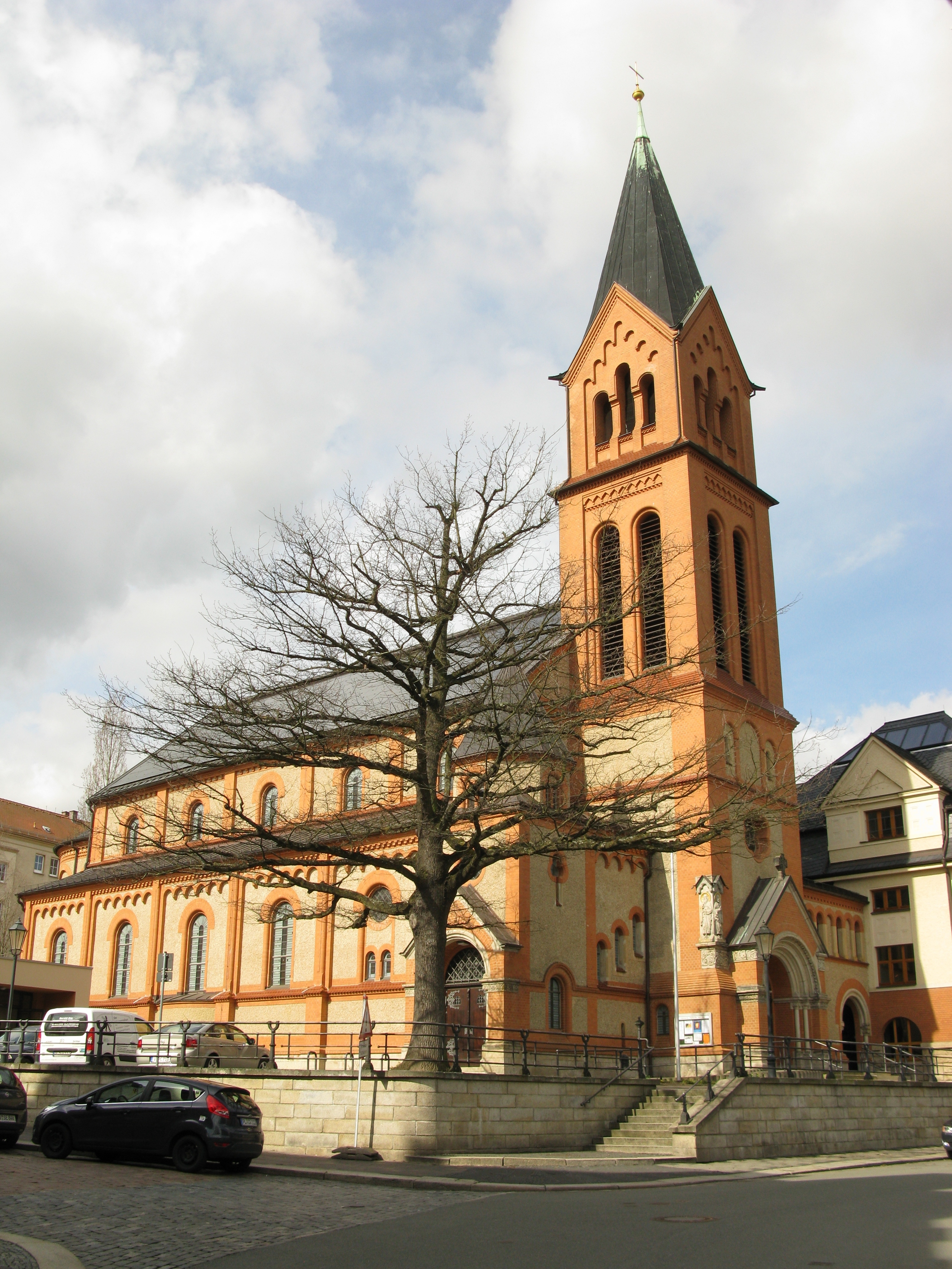 Plauen, denkmalgeschütztes Herz-Jesu-Kirche in der Gustav-Adolf-Straße